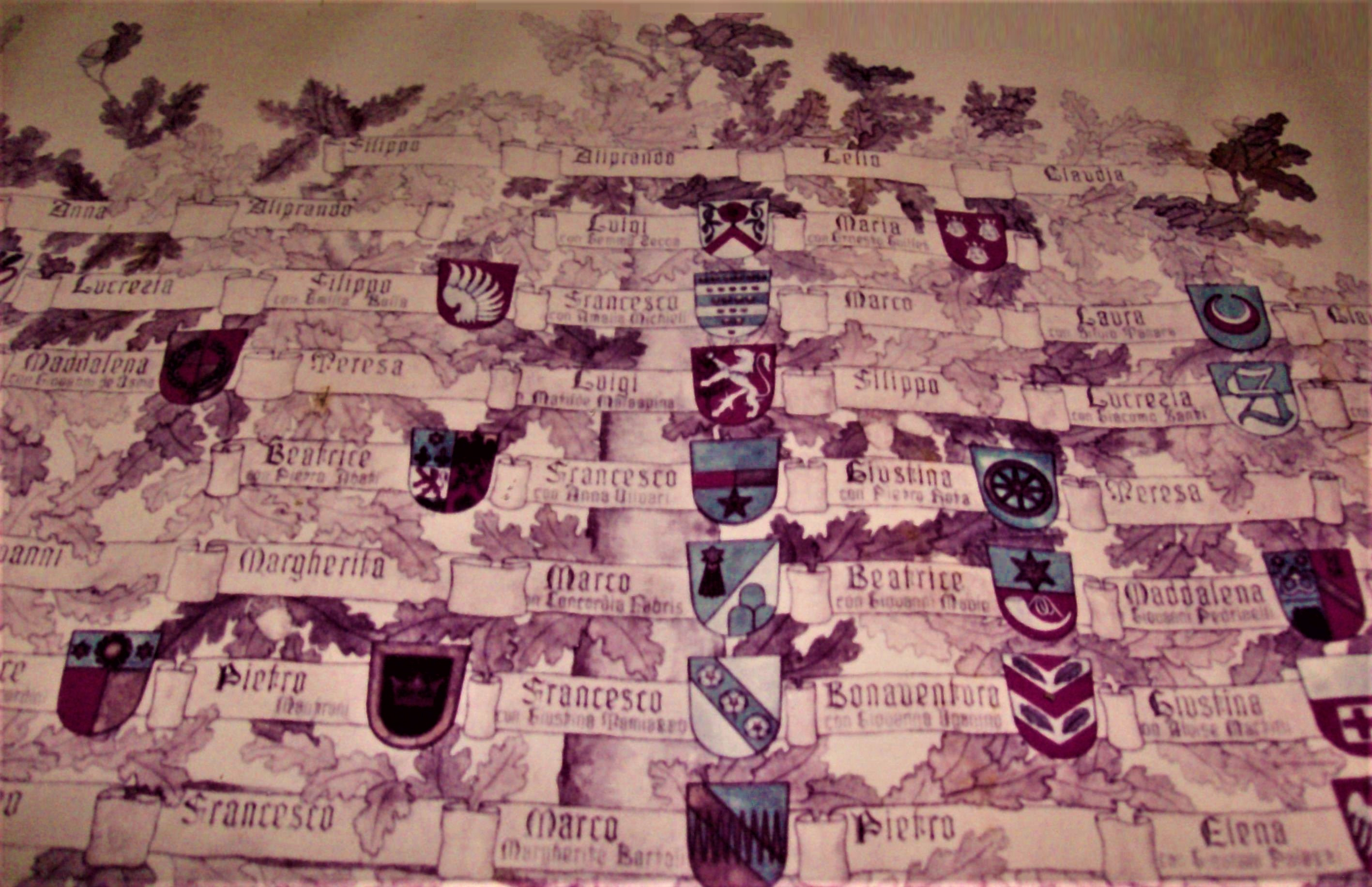 Albero genealogico della famiglia Fanzago degli Aliprandi proveniente dall'abitazione del nobile cavaliere Aliprando Fanzago degli Aliprandi (Padova 8 aprile 1920 - Bassano del Grappa 12 agosto 2007) collezione privata